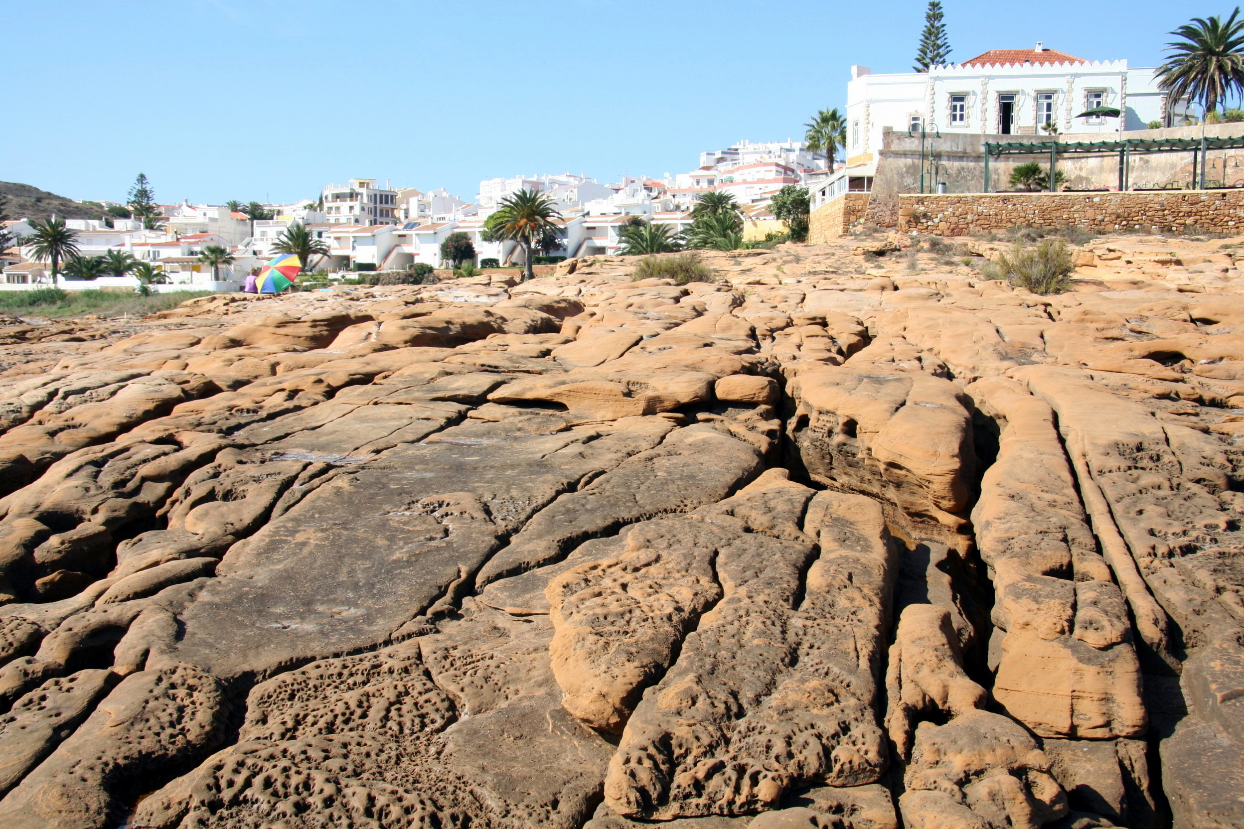 Algarve, Küste bei Luz